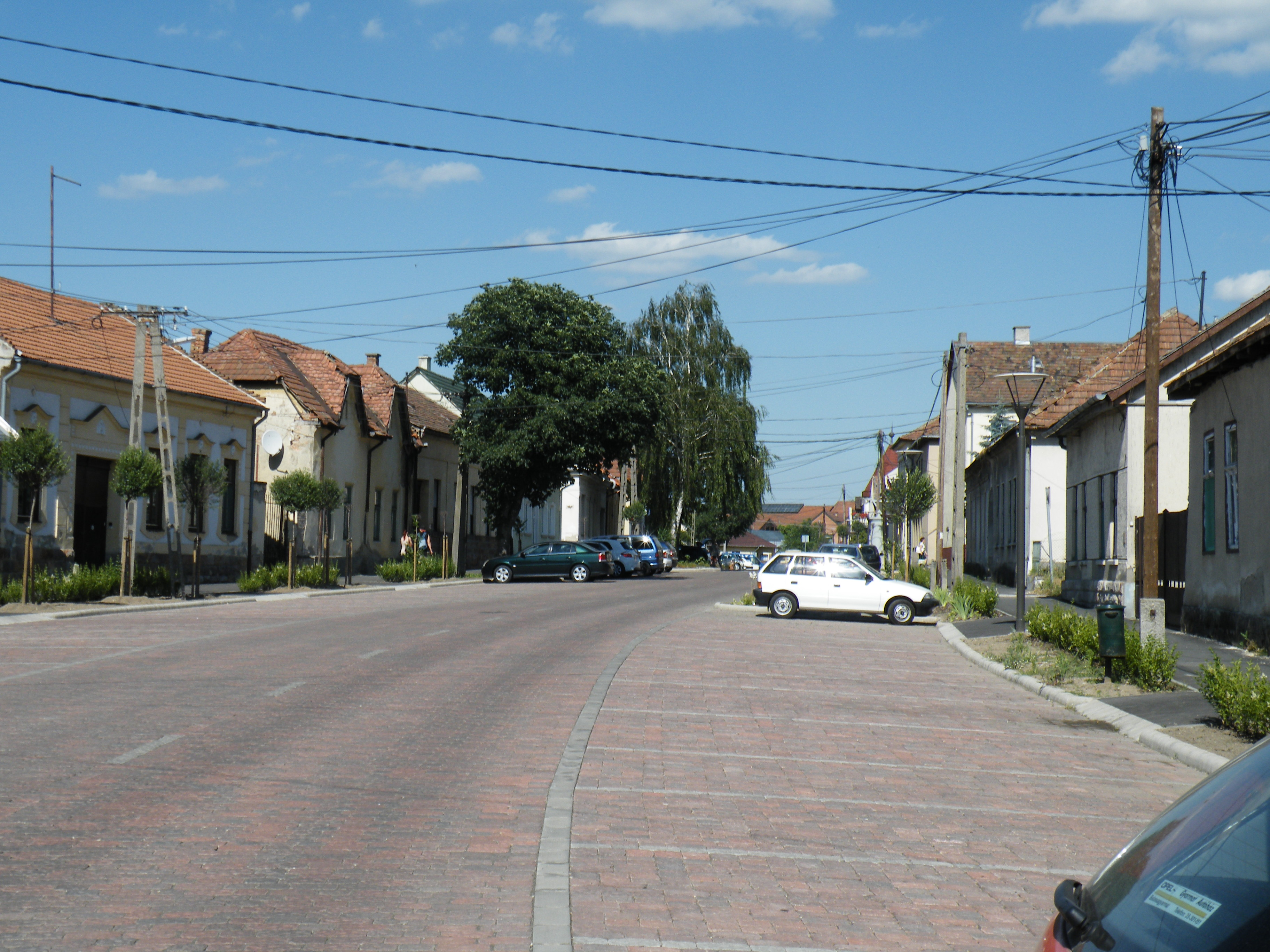 Balassagyarmat felújított Óváros tere